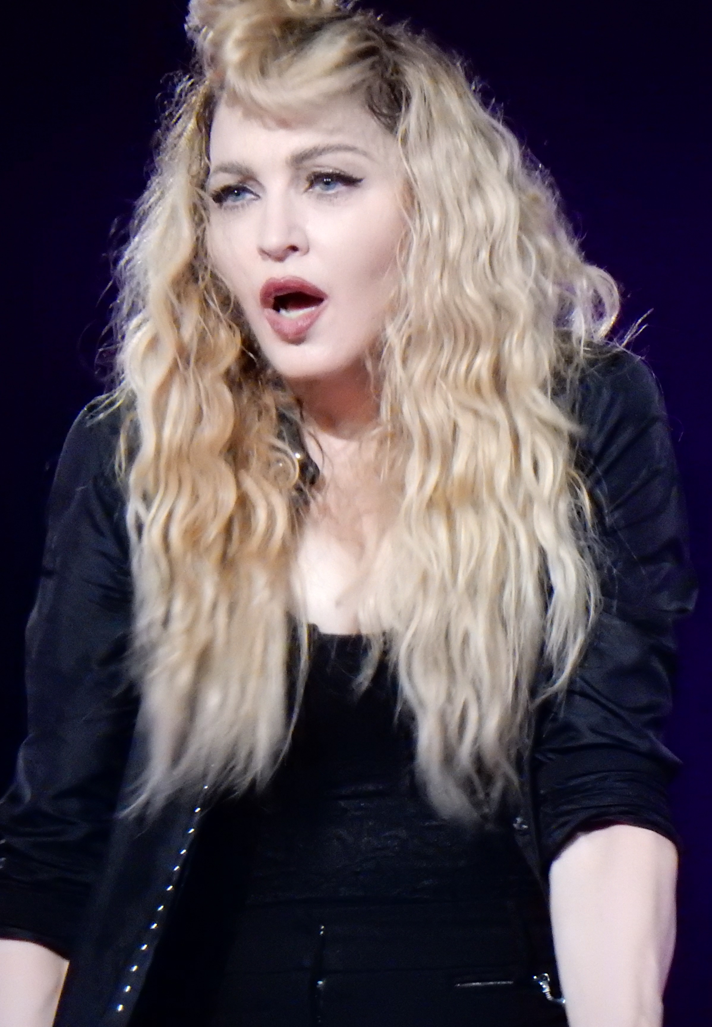 Madonna - Rebel Heart Toru 2015 - Prague 1